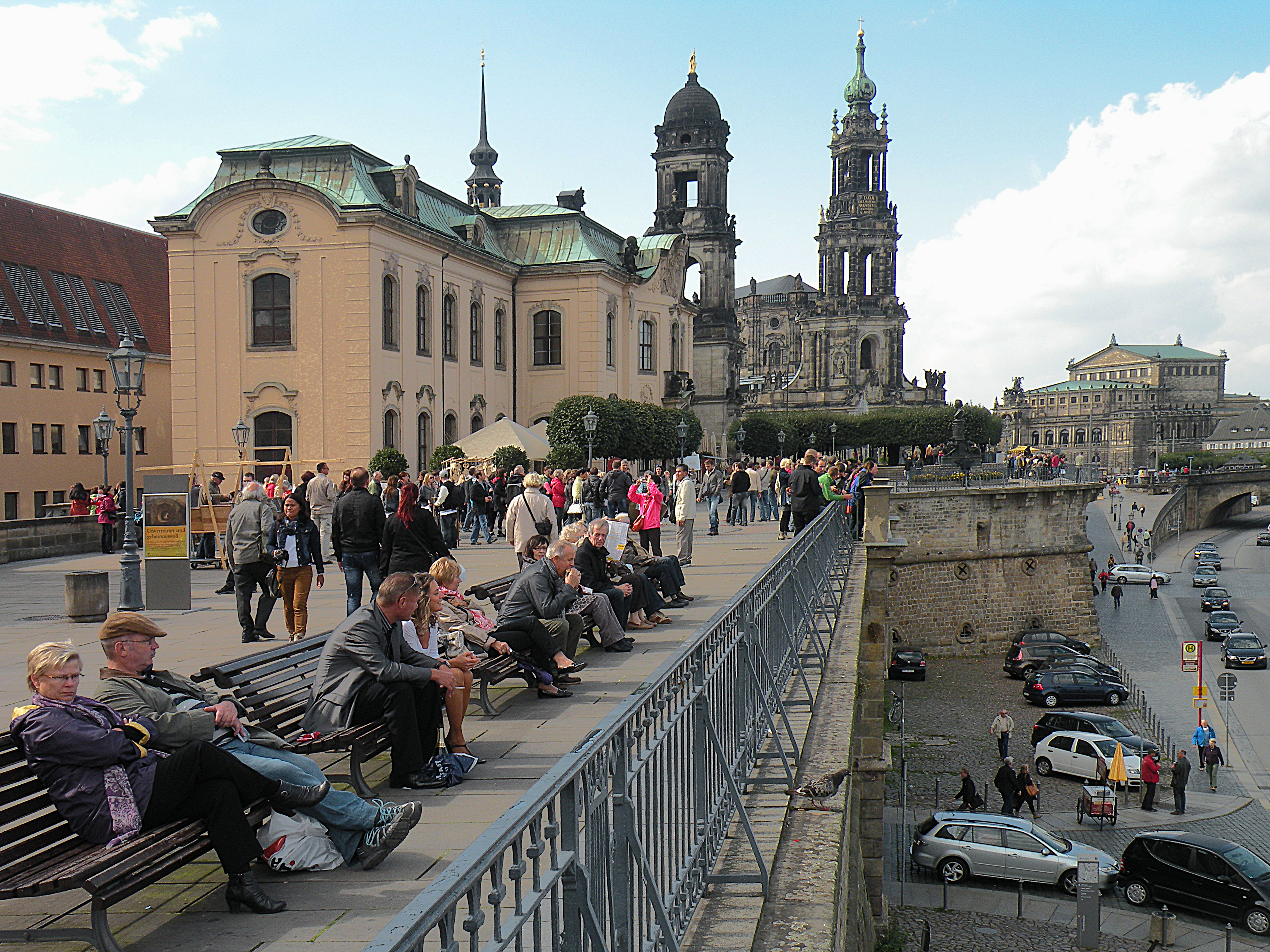 Bruelische_Terrasse.